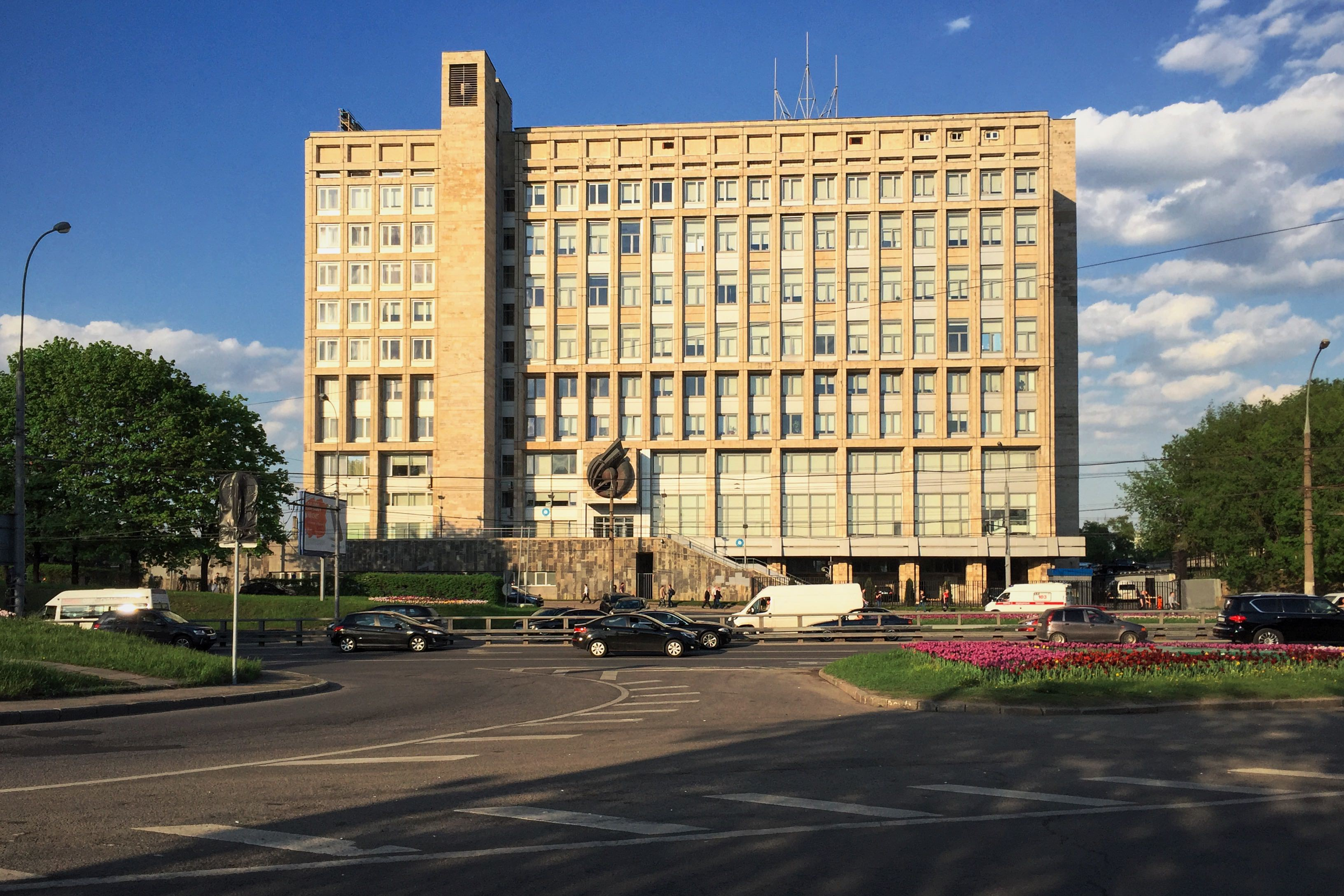 Дмитровское шоссе. Атомстройэкспорт